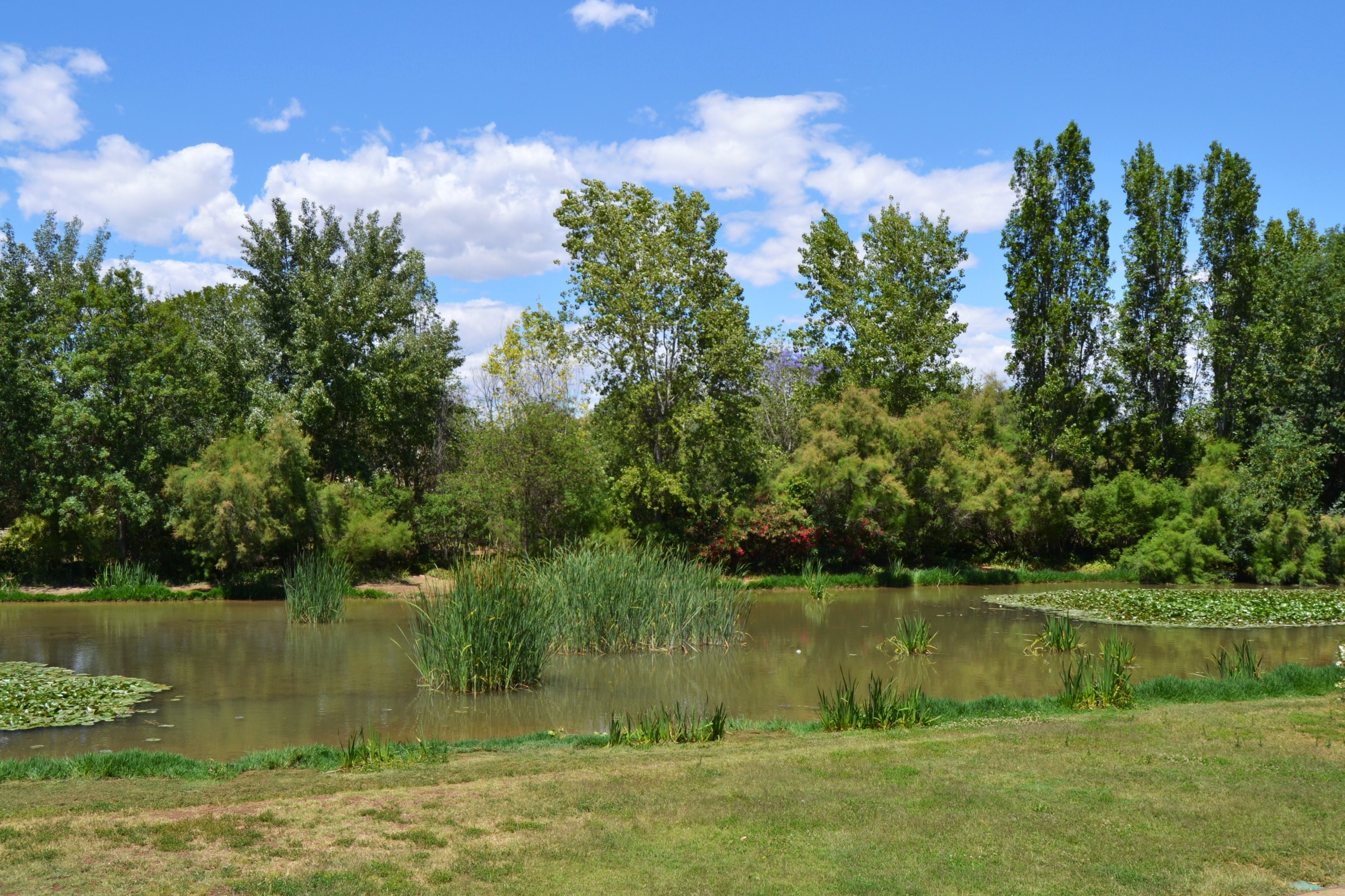 Vista de la llacuna del parc de la Rambleta, València.